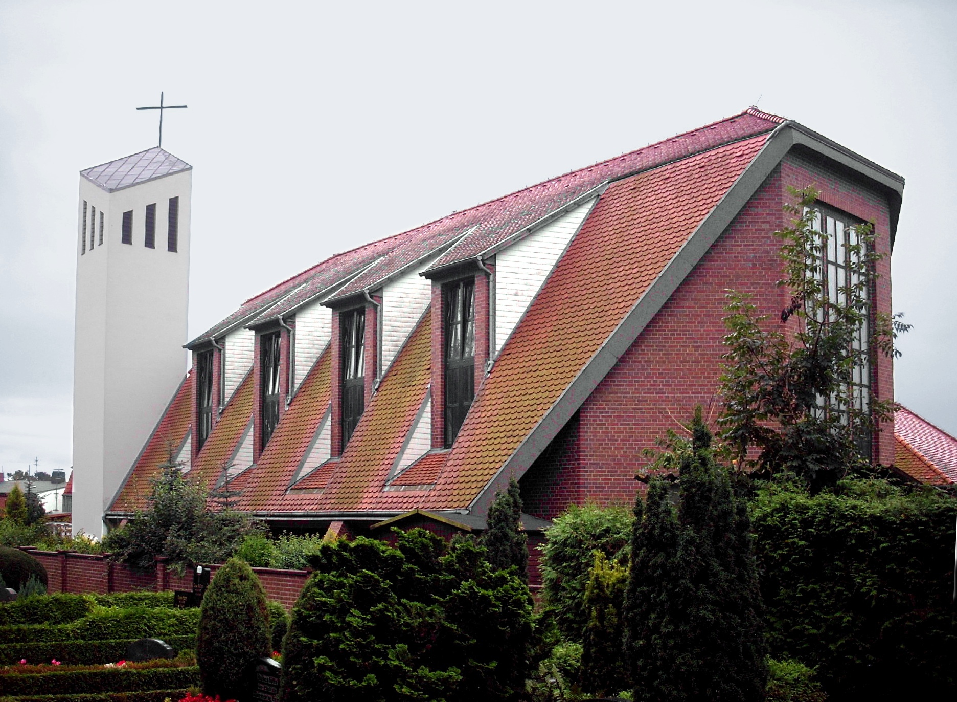 Grevesmühlen, Niels Stensen Catholic Church